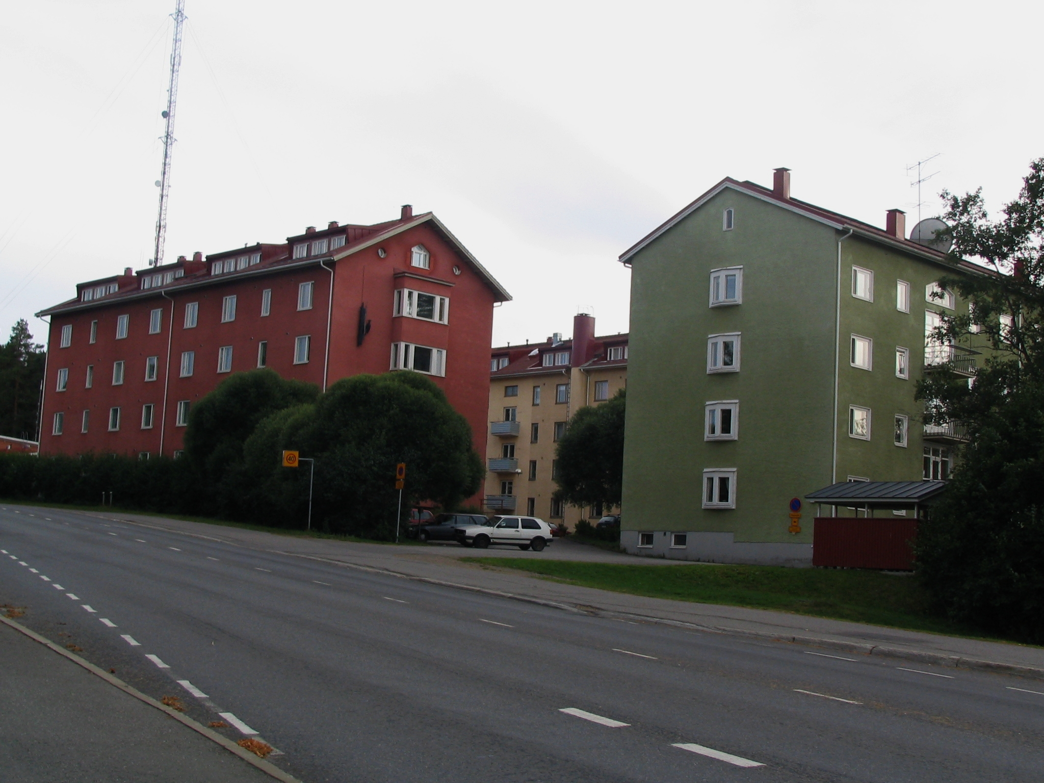 Some buildings in Niinivaara, Joensuu